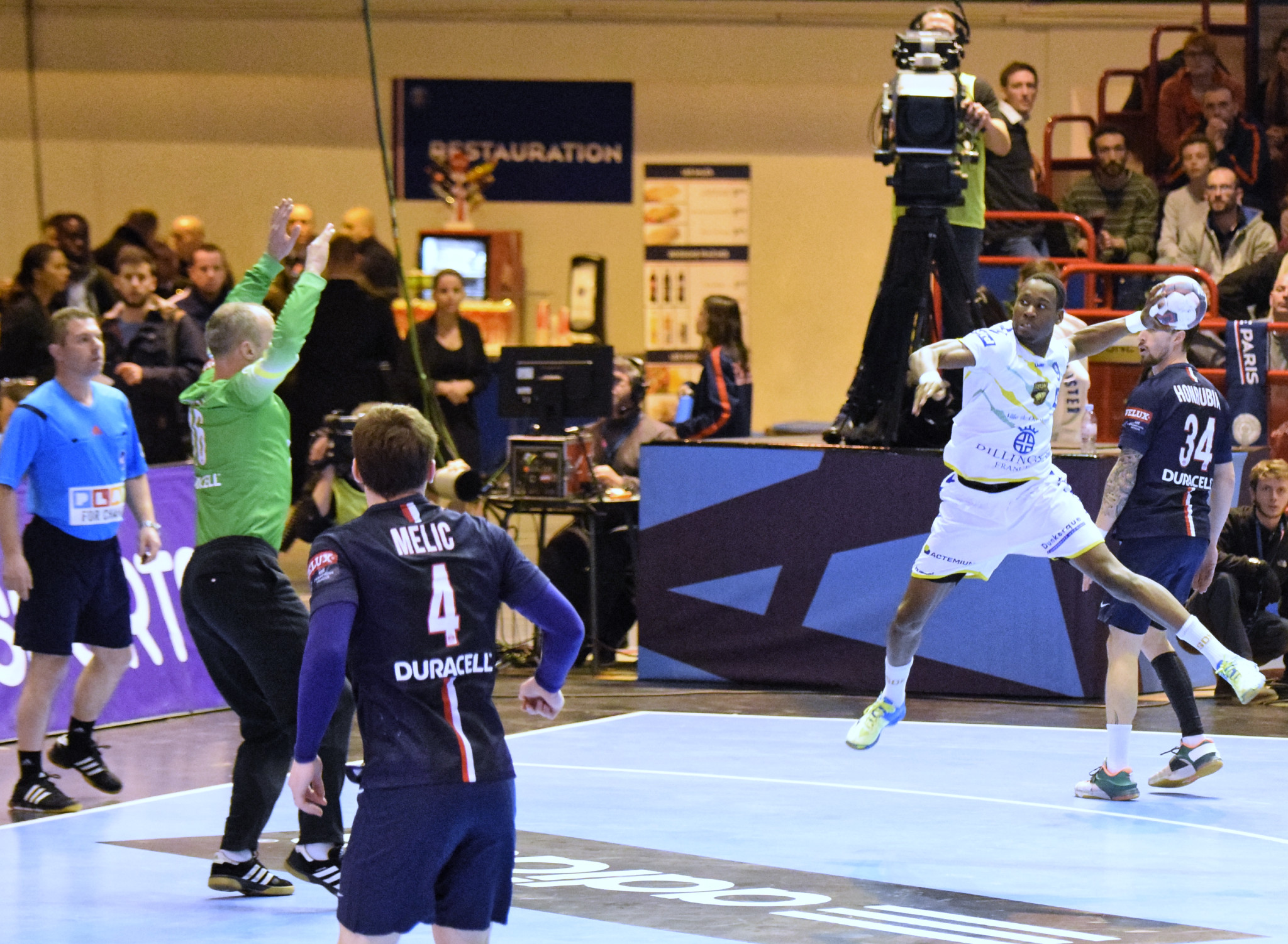 Rencontrede ligue des champions entre le PSG et l'US Dunkerque. A la Halle Carpentier (Paris), le 22 mars 2015.